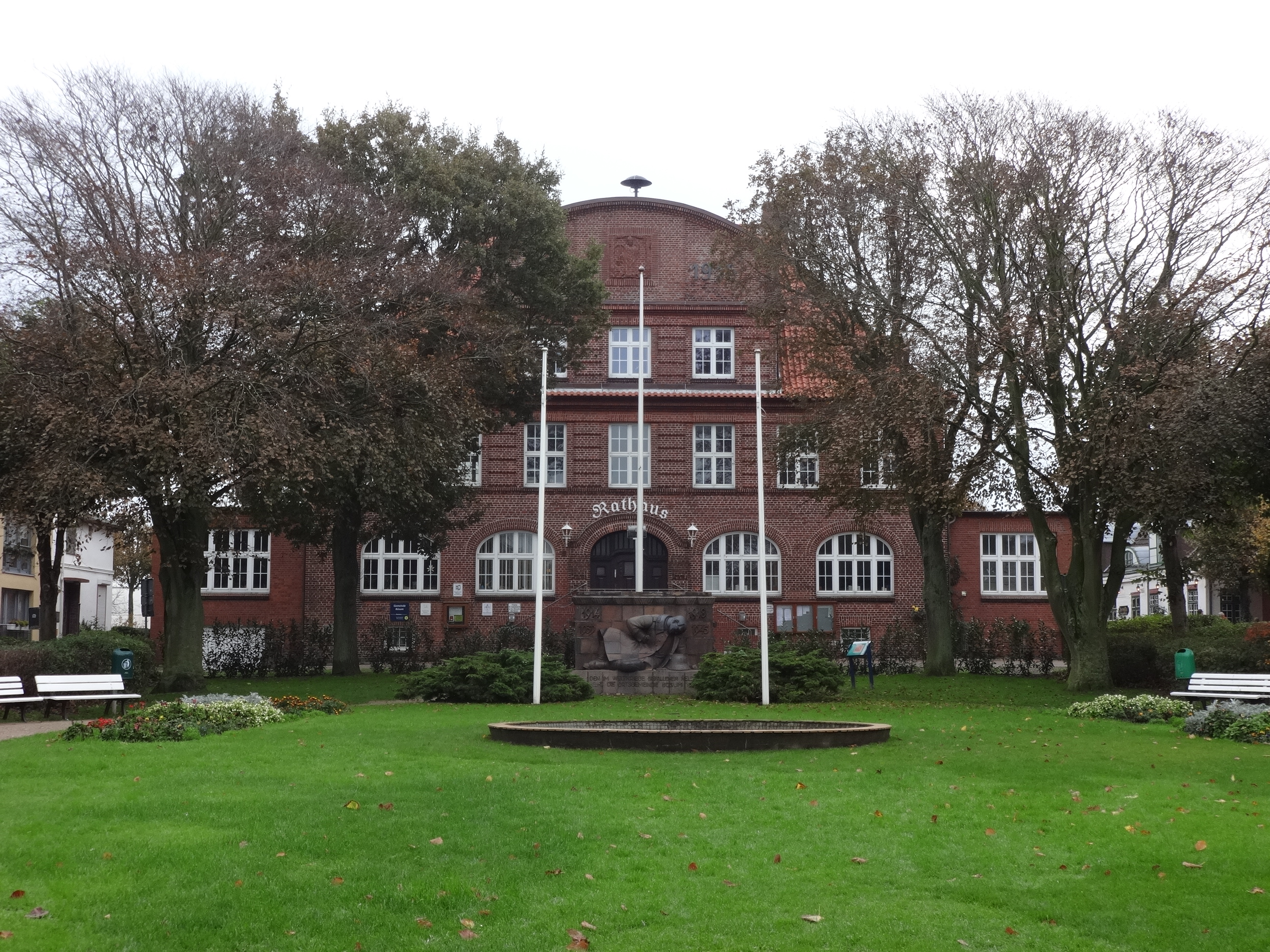 Zweigeschossiger Bau im Barockstil, erbaut von 1914 bis 1915 von C. Mannhardt aus Kile. Vor dem Gebäude befindet sich der Kaiser-Wilhelm-Platz mit einem Ehrenmal für Gefallene der Weltkriege.